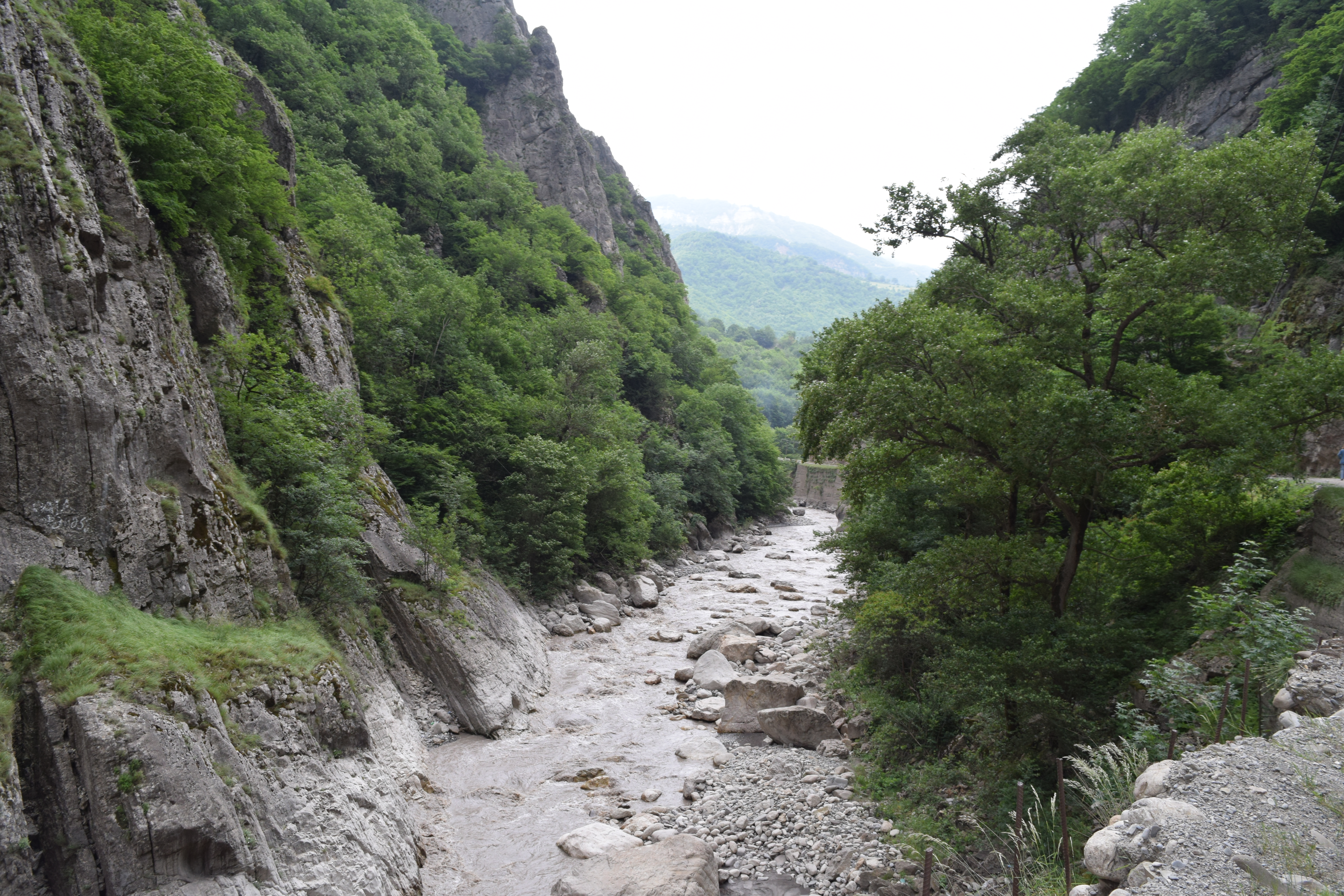 Quba 3